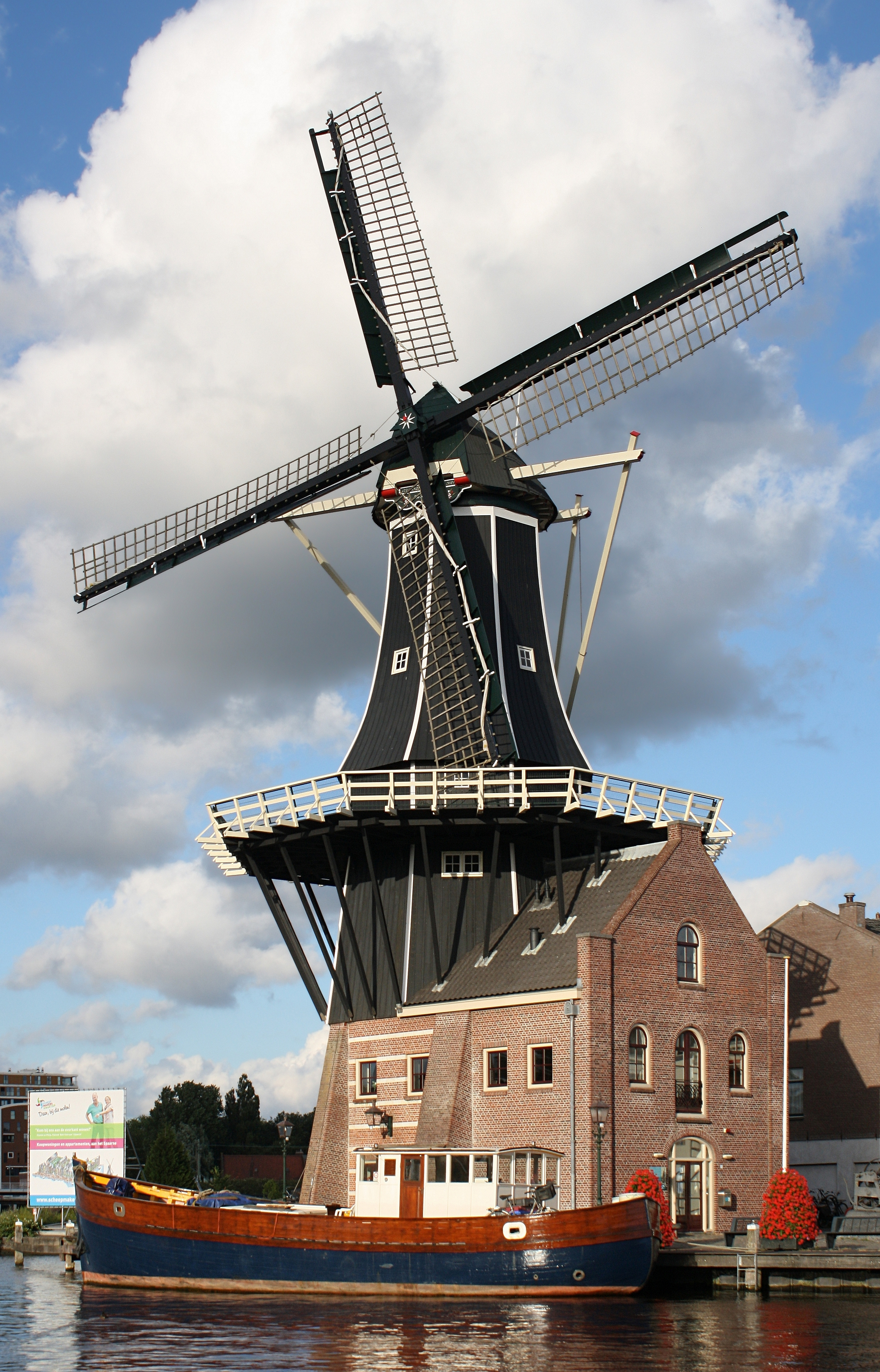 Il mulino a vento De Adriaan ad Haarlem (Paesi Bassi).